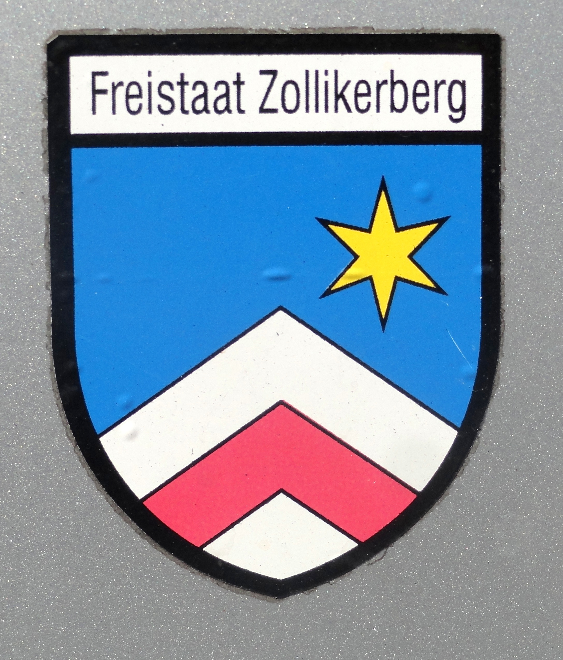 Wappen «Freistaat Zollikerberg»